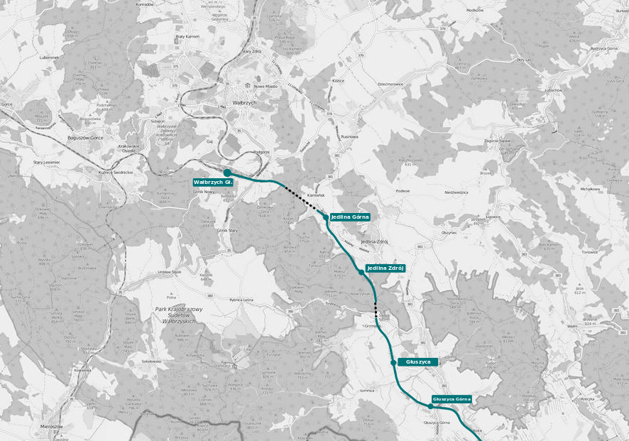 Schemat przebiegu linii kolejowej Kłodzko-Wałbrzych